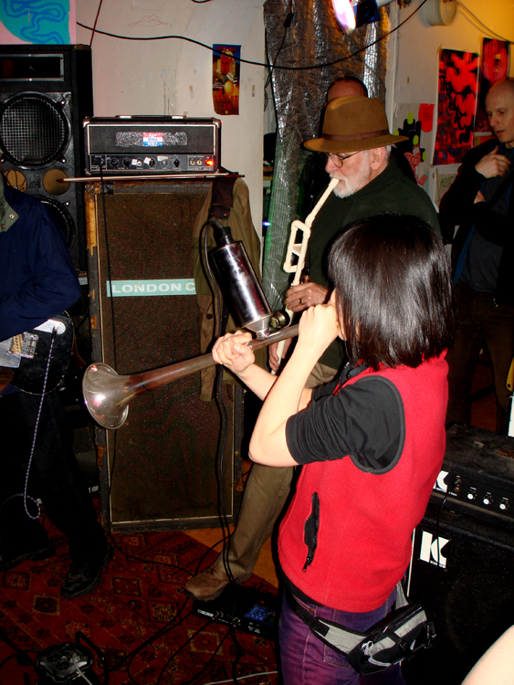 Nihilist Spasm Band en concert à Helbaard, La Haye (Hollande)